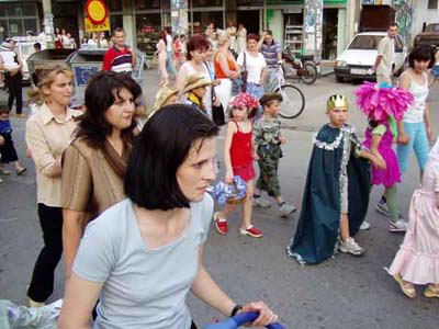 Власотинчани, снимљено у центру града